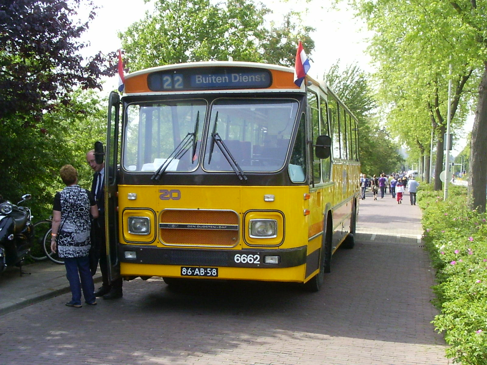 Zuidooster vintage bus 6662 dating from 1978